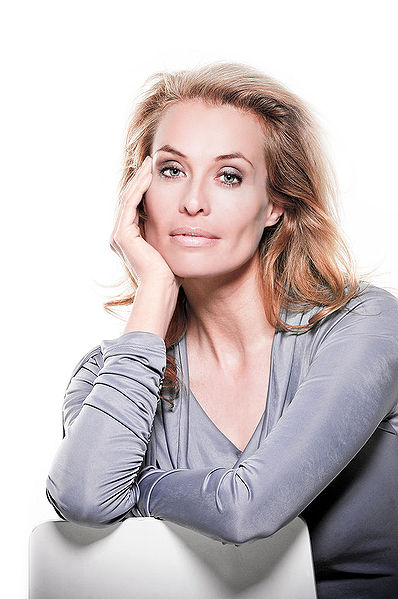 Frederique van der Wal